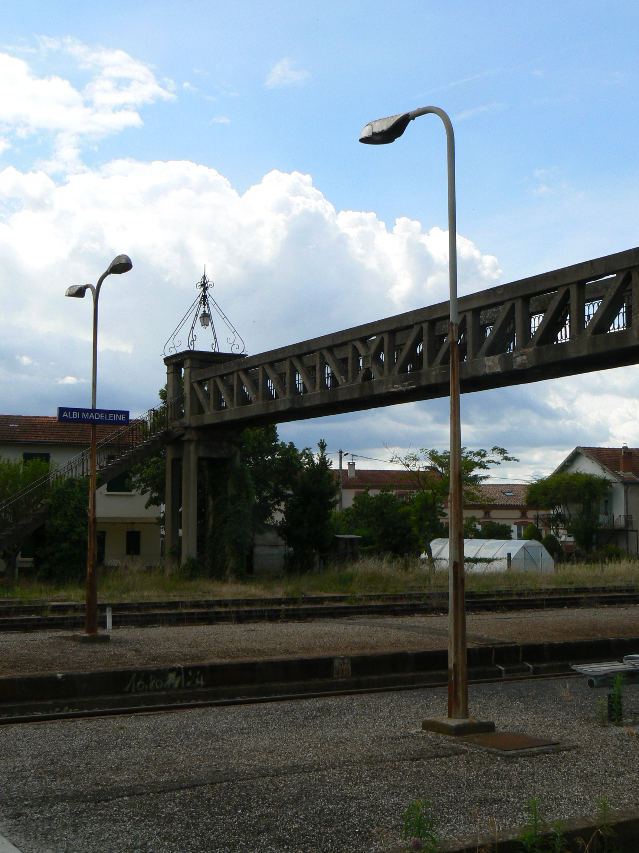 Quai de la gare de la Madeleine à Albi